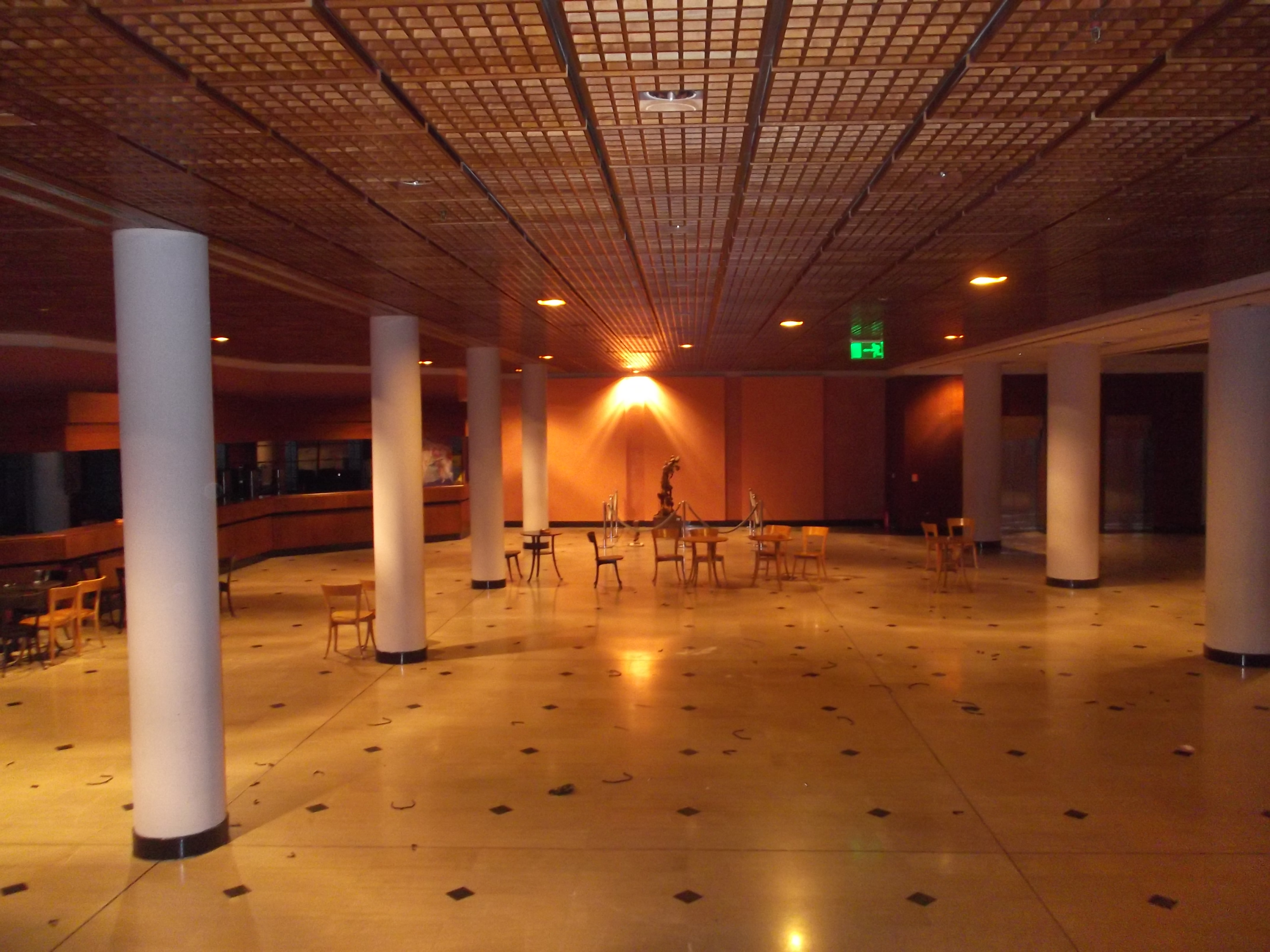 Άποψη από το εσωτερικό του Βασιλικού Θεάτρου Θεσσαλονίκης.